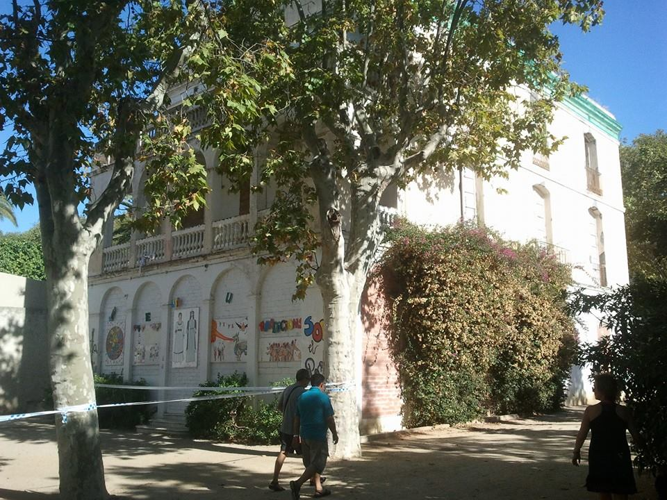 Un dels edificis de l'Escola Artur Martorell, dins el Parc de Can Soley de Badalona